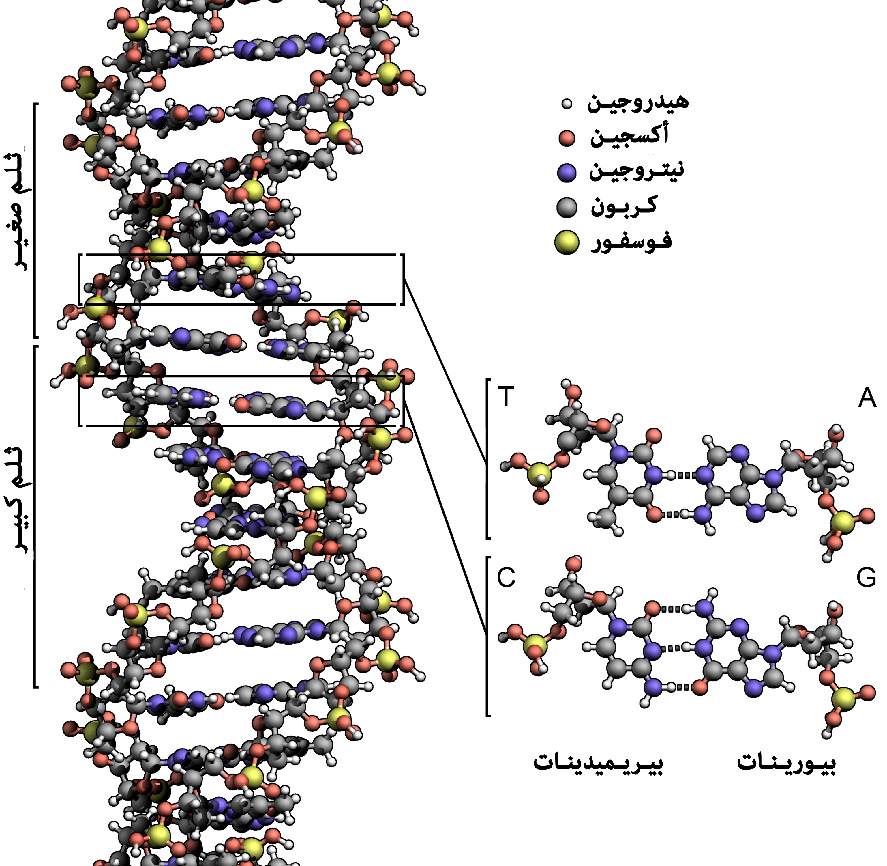 بنية الدنا توضح بالتفصيل بنية القواعد الأربعة: أدينين، ثايمين، غوانين، سايتوسين وكذلك الثلمين الكبير والصغير.